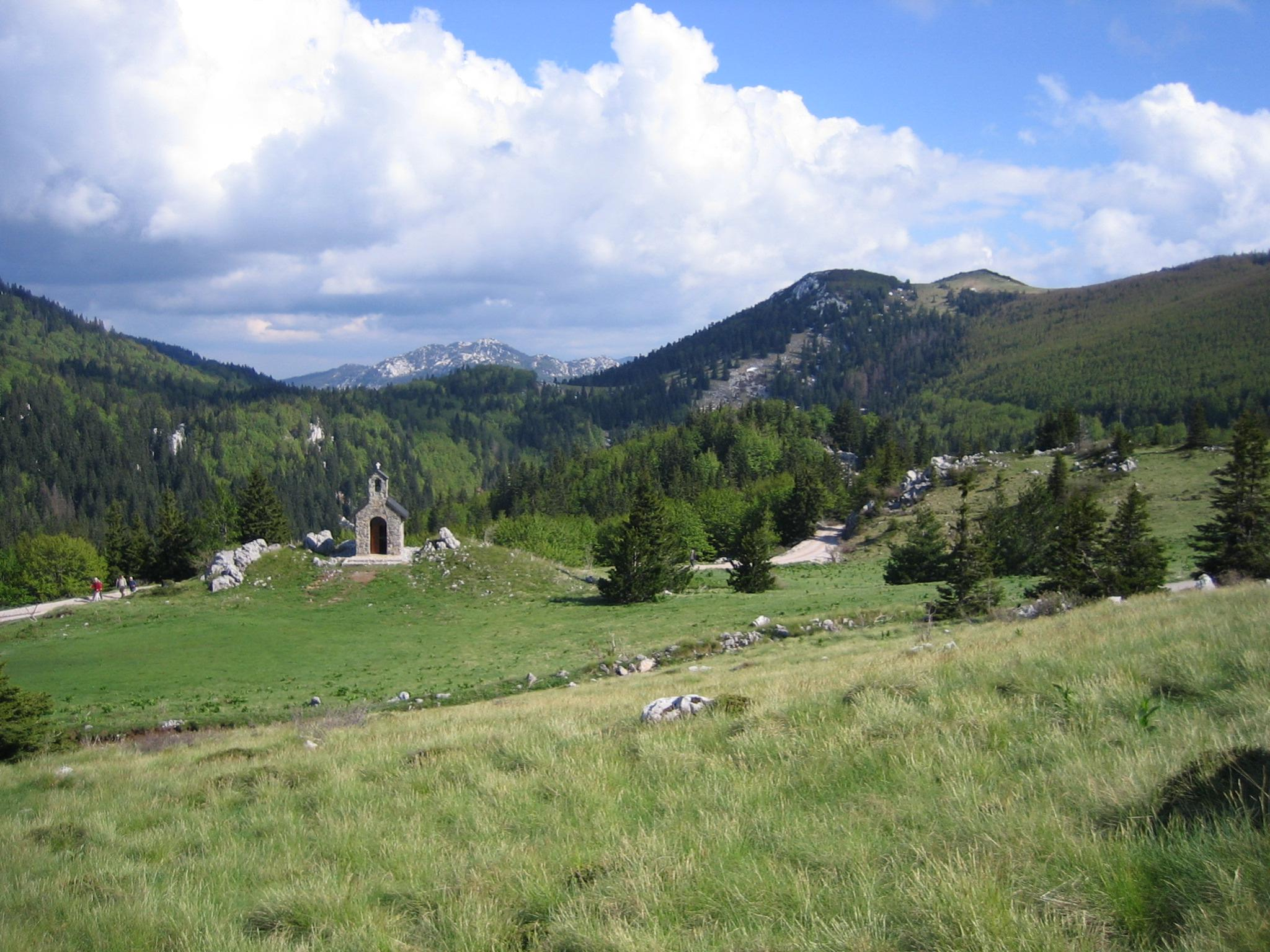 Nationalpark Nord-Velebit